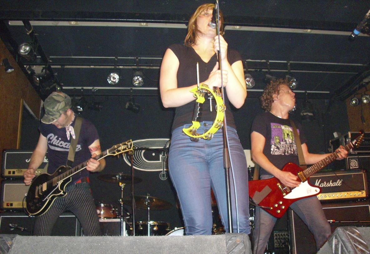 Sala Gruta 77 , Madrid , 12 Abril 2008